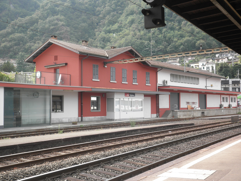 Stazione ferroviaria di Melide